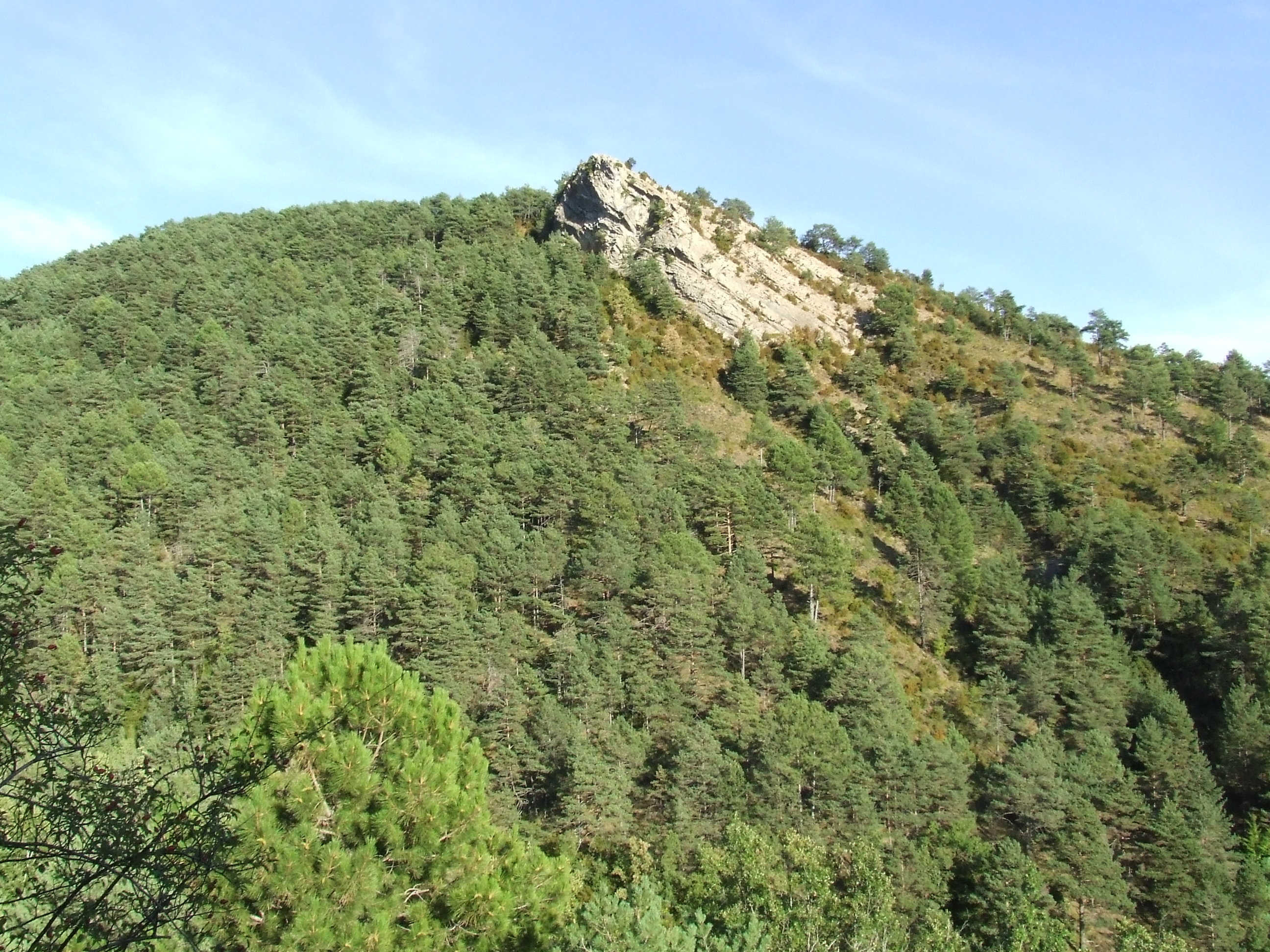 El Tossal dels Tres Senyors (Bóixols, Abella de la Conca)